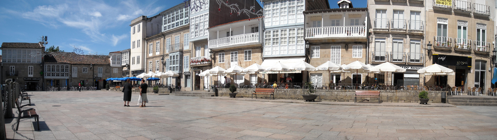 Plaza Mayor de Celanova, frente al Mosteiro de San Rosendo, en el Concello de Celanova (San Rosendo), Ourense, Galicia, España - toma de verano, agosto de 2008 Panoramas, España, Galicia